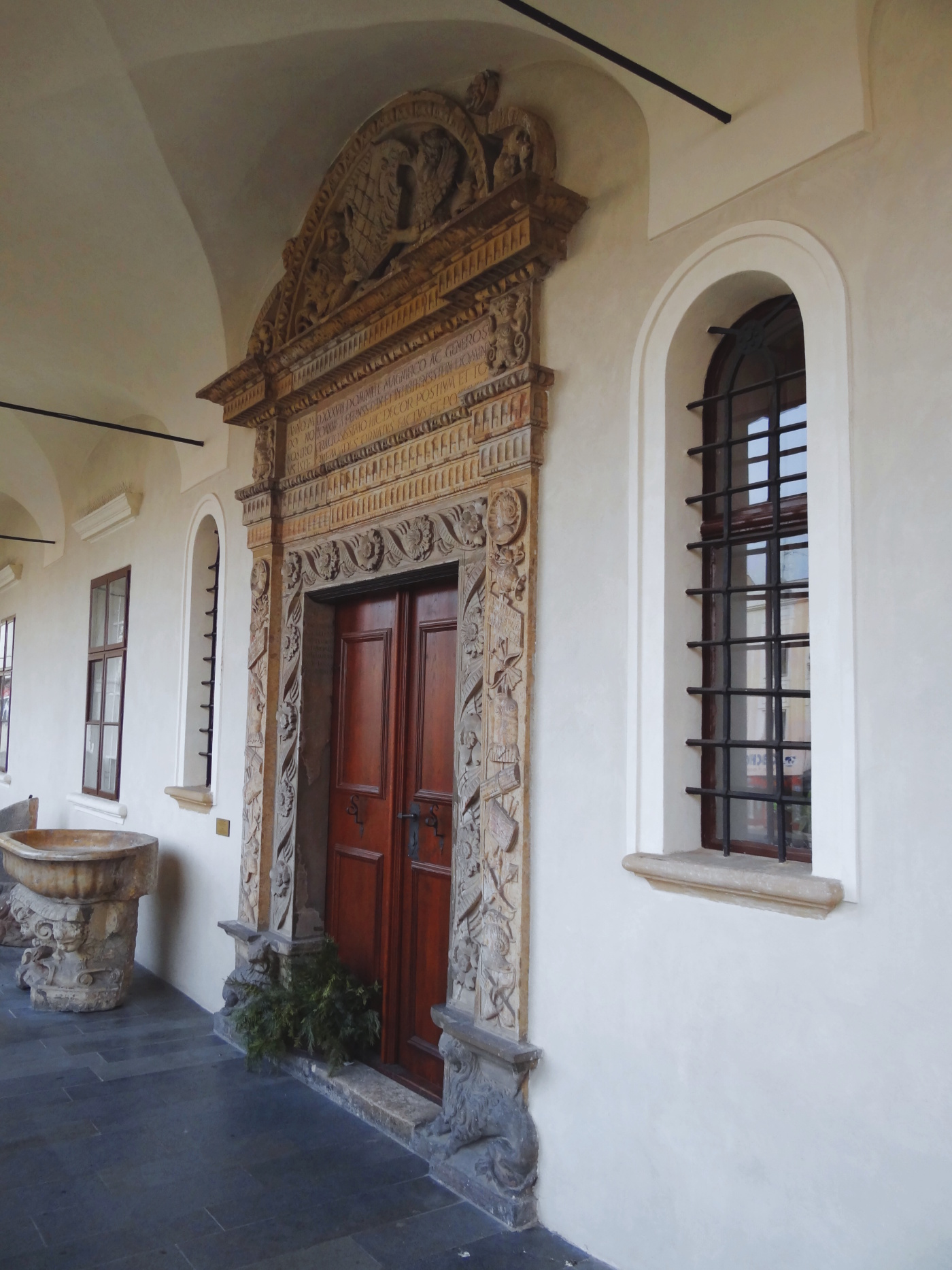 Prostějov - vstup do staré radnice z náměstí